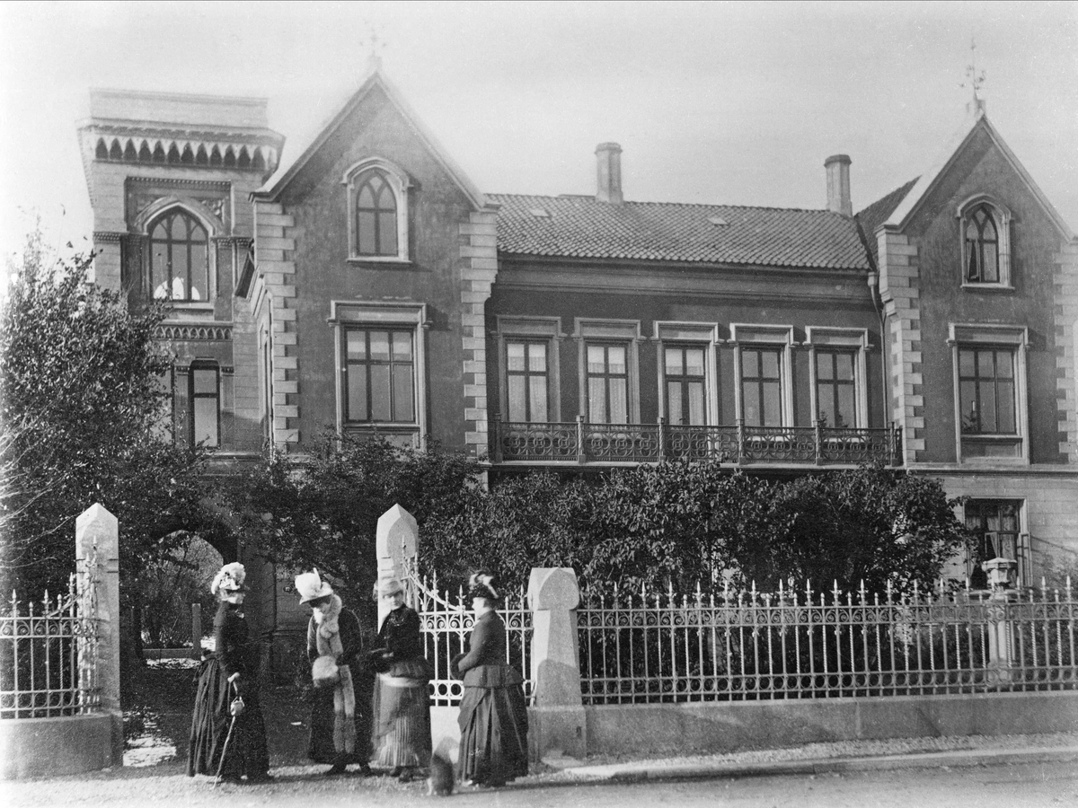 Oscars gate 27, ca. 1900. Senere har bygget bl.a. fått en ekstra etasje og puss på fasaden.